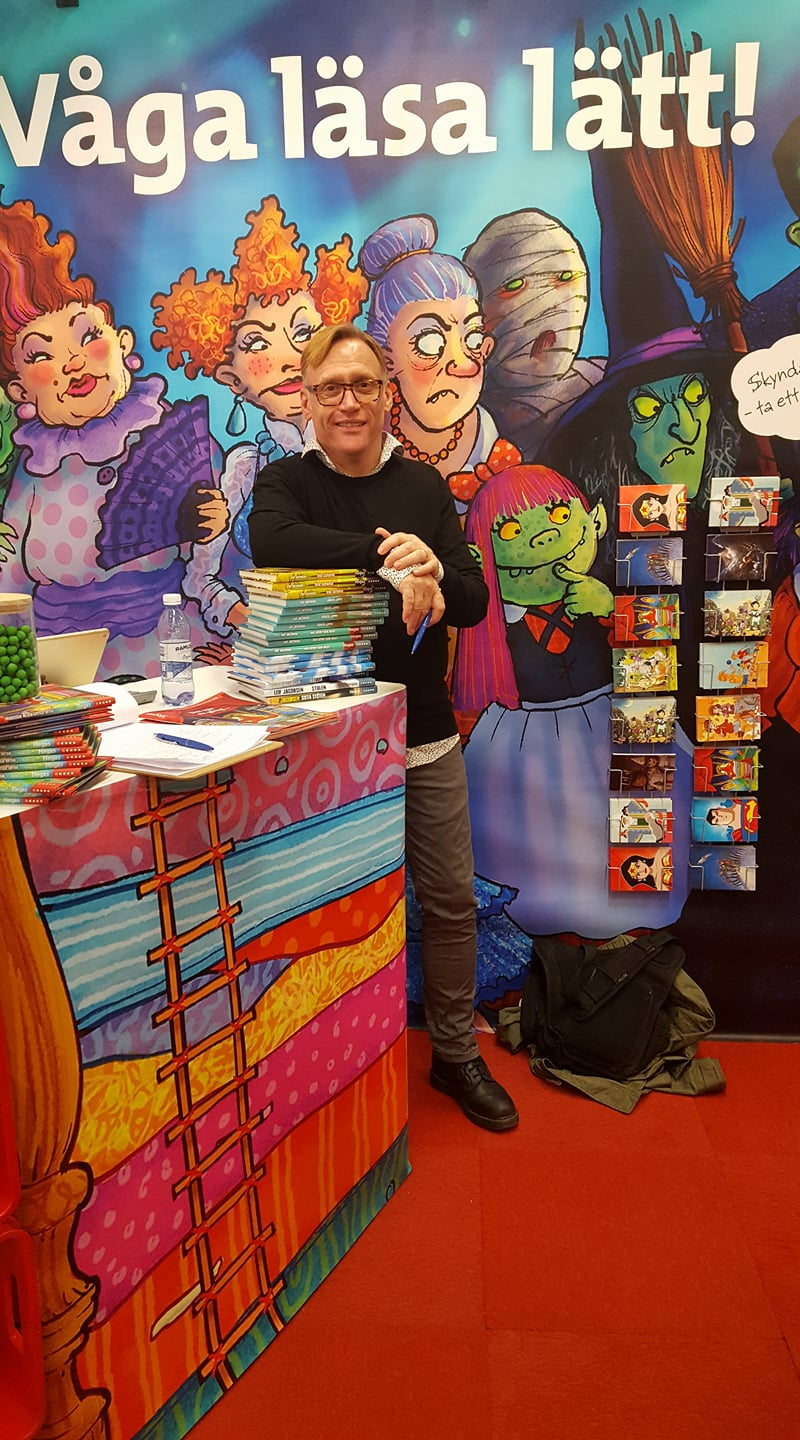 Leif Jacobsen i Hegas monter under Göteborgs bokmässa 2017.